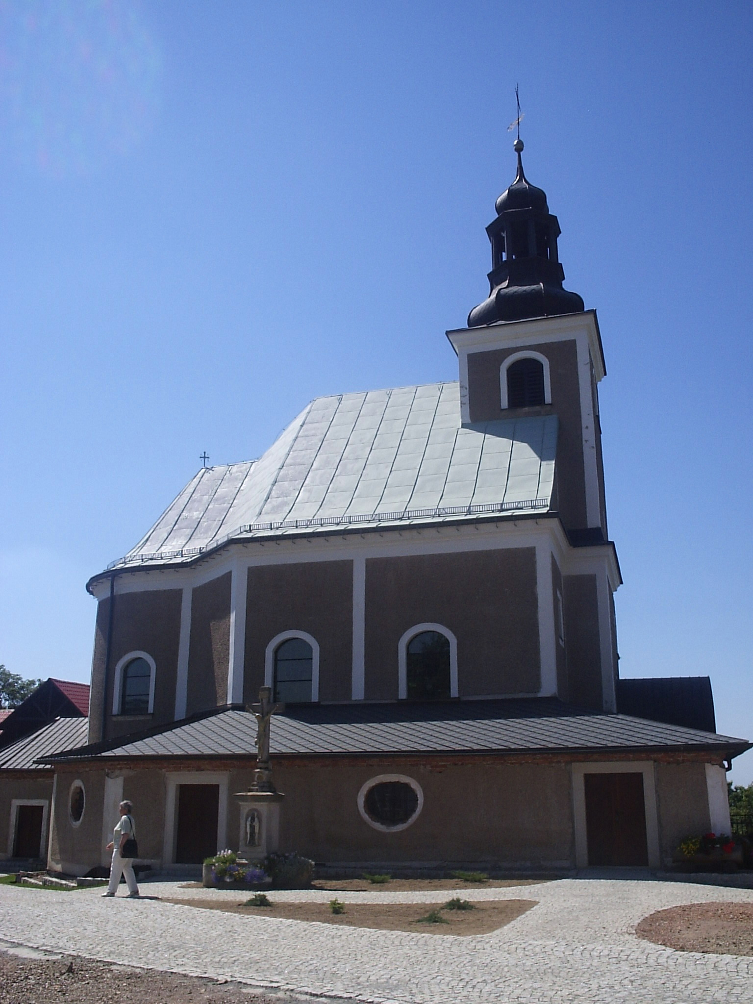 de: Wallfahrtskirche Maria Schnee, Mariensanktuarium unterhalb des Góra Igliczna (Spitziger Berg) im Masyw Śnieżnika (Glatzer Schneegebirge) bei Międzygórze (früher Wölfelsgrund) in Polen, Woiwodschaft Dolnośląskie (Niederschlesien), Powiat Kłodzki en: Church in Poland, Voivodeship Dolnośląskie (Lower Silesia), Kłodzko County pl: Międzygórze - kościół pątniczy MB Śnieżnej, na Górze Iglicznej, 1781-84.